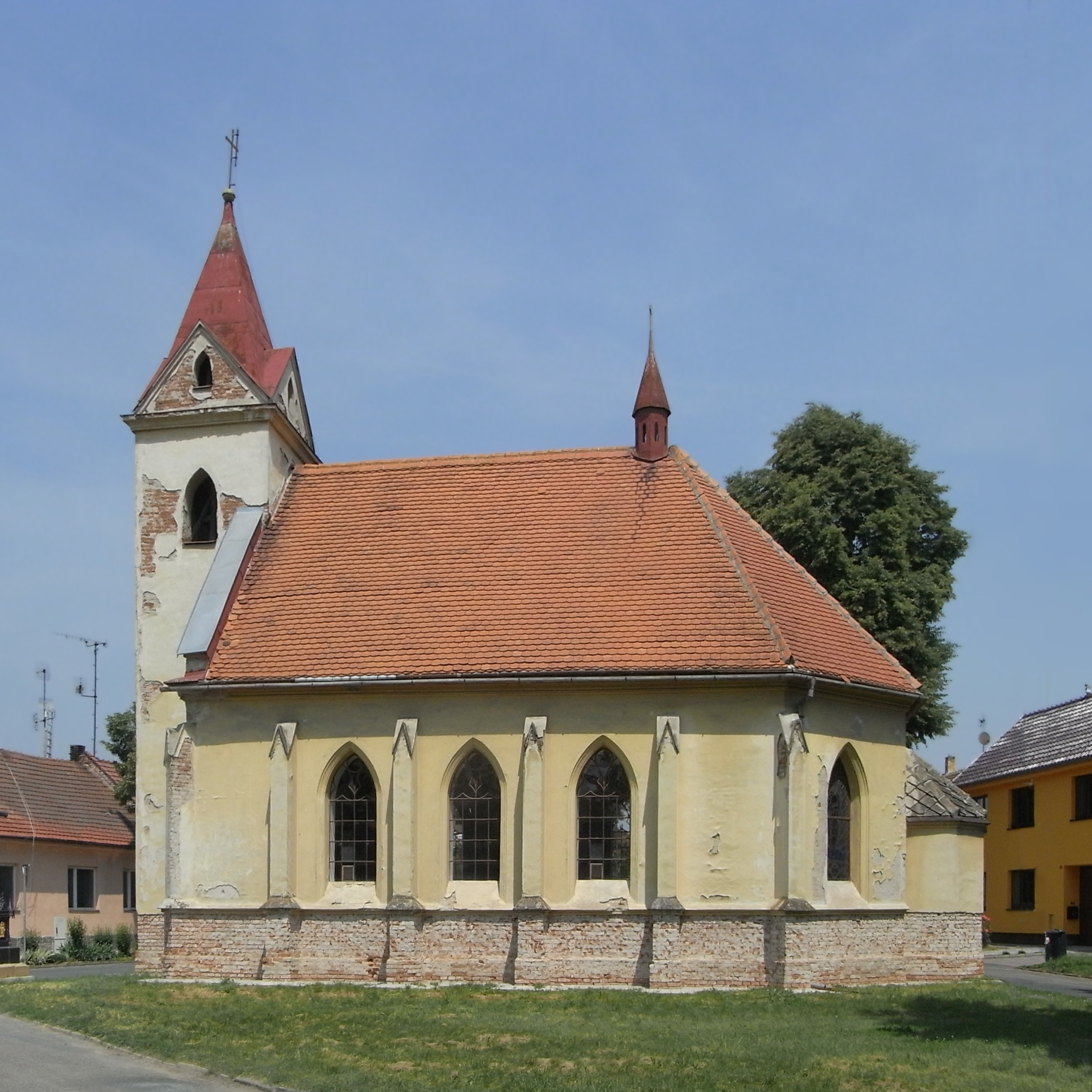 Přízřenice, kostel svaté Markéty